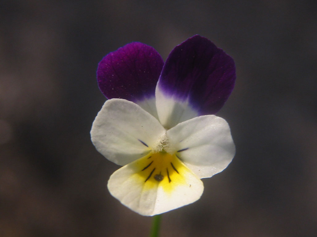 Acker-Stiefmütterchen (Viola arvensis) Fundort: Luzern